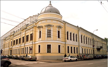 Москва. Ул. Воздвиженка, 9. Дом генерала В.В. Грушецкого. Он же "дом Болконских" в "Войне и мир"